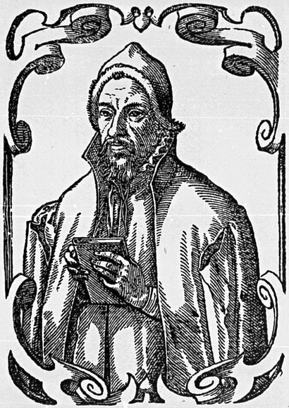 Justus Vultejus